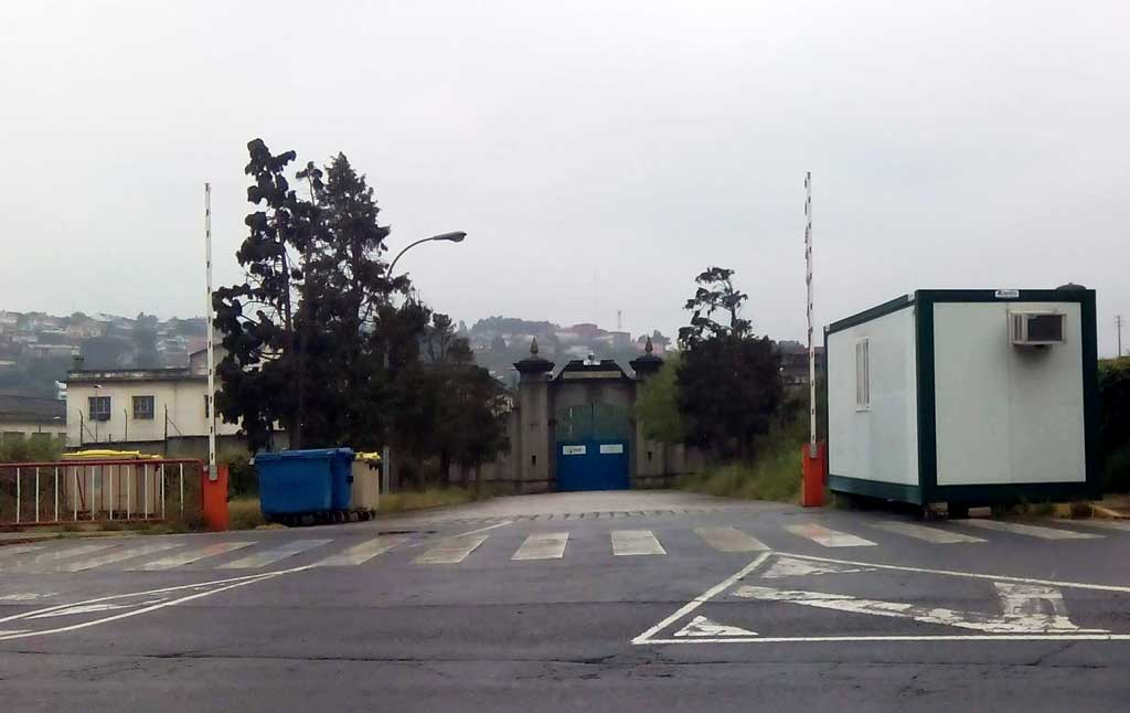 Acceso a Hércules de Armamento.